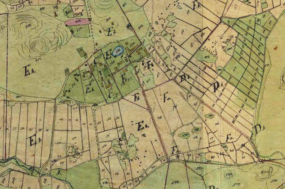 Laga skifte, Arealutredning, del av karta över Akalla by